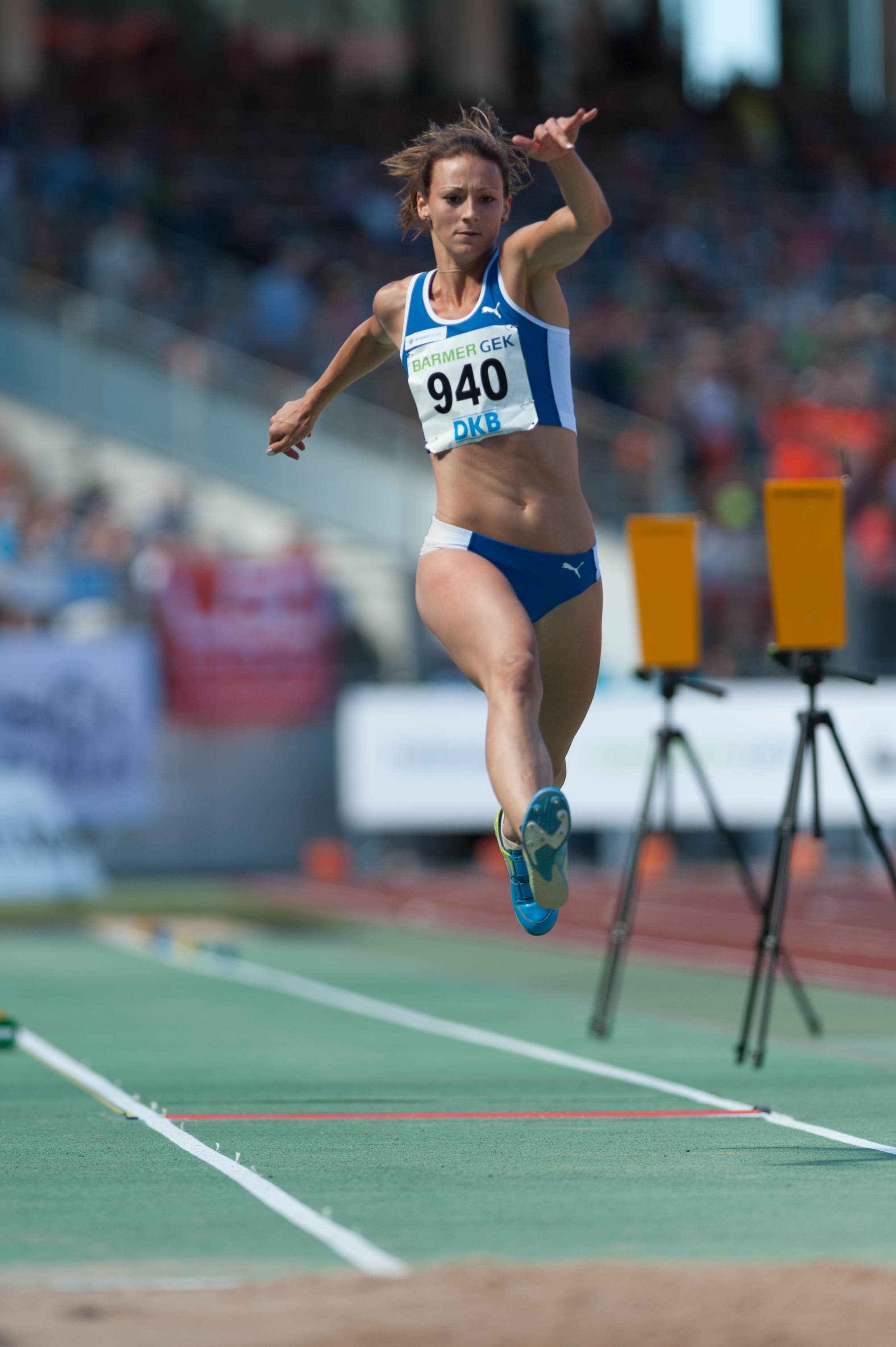 Deutsche Leichtathletik-Meisterschaften 2015: Frauen Dreisprung - Kristin Gierisch, LAC Erdgas Chemnitz